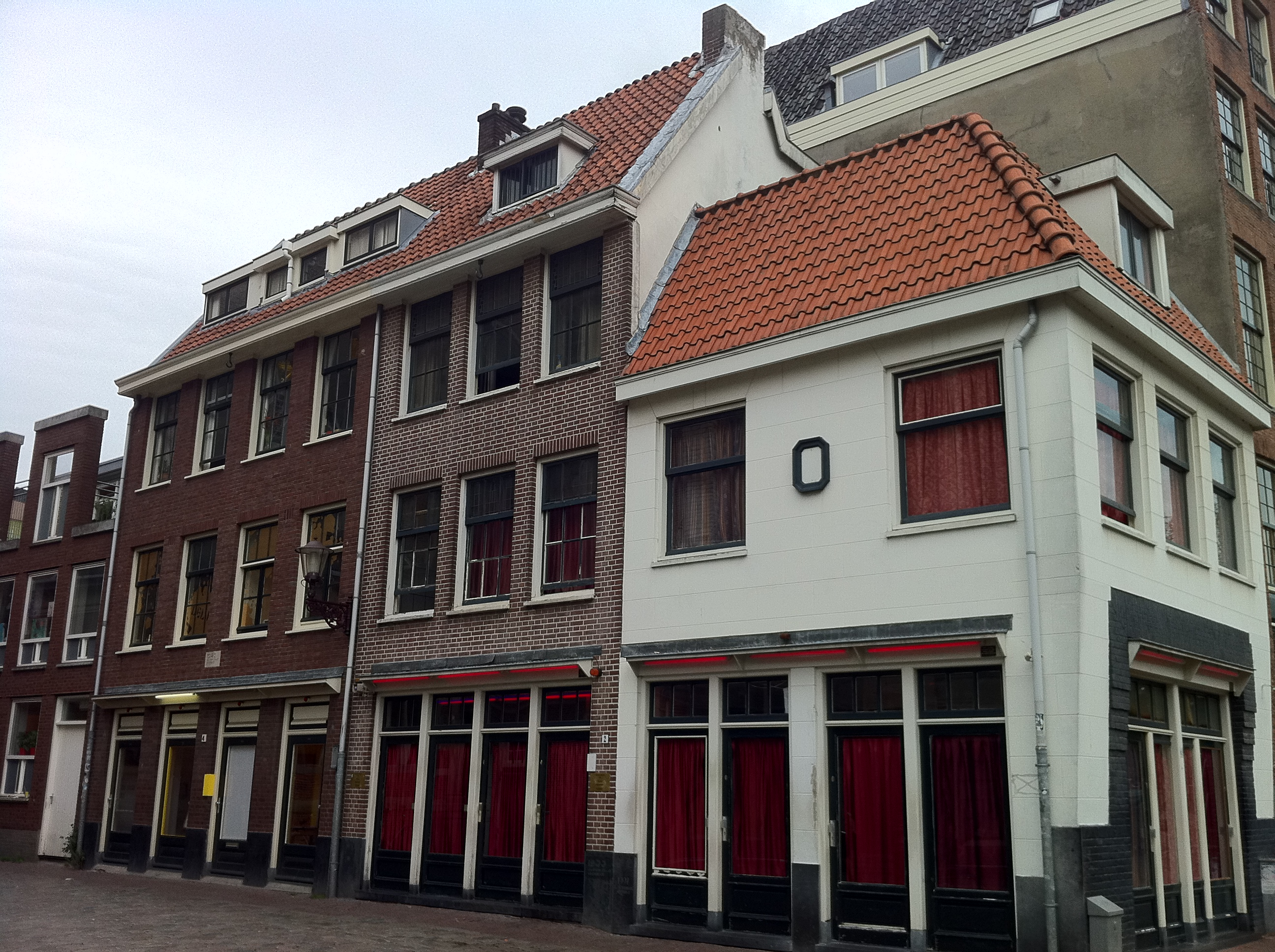 Oudekerksplein 2-4 Amsterdam, augustus 2011